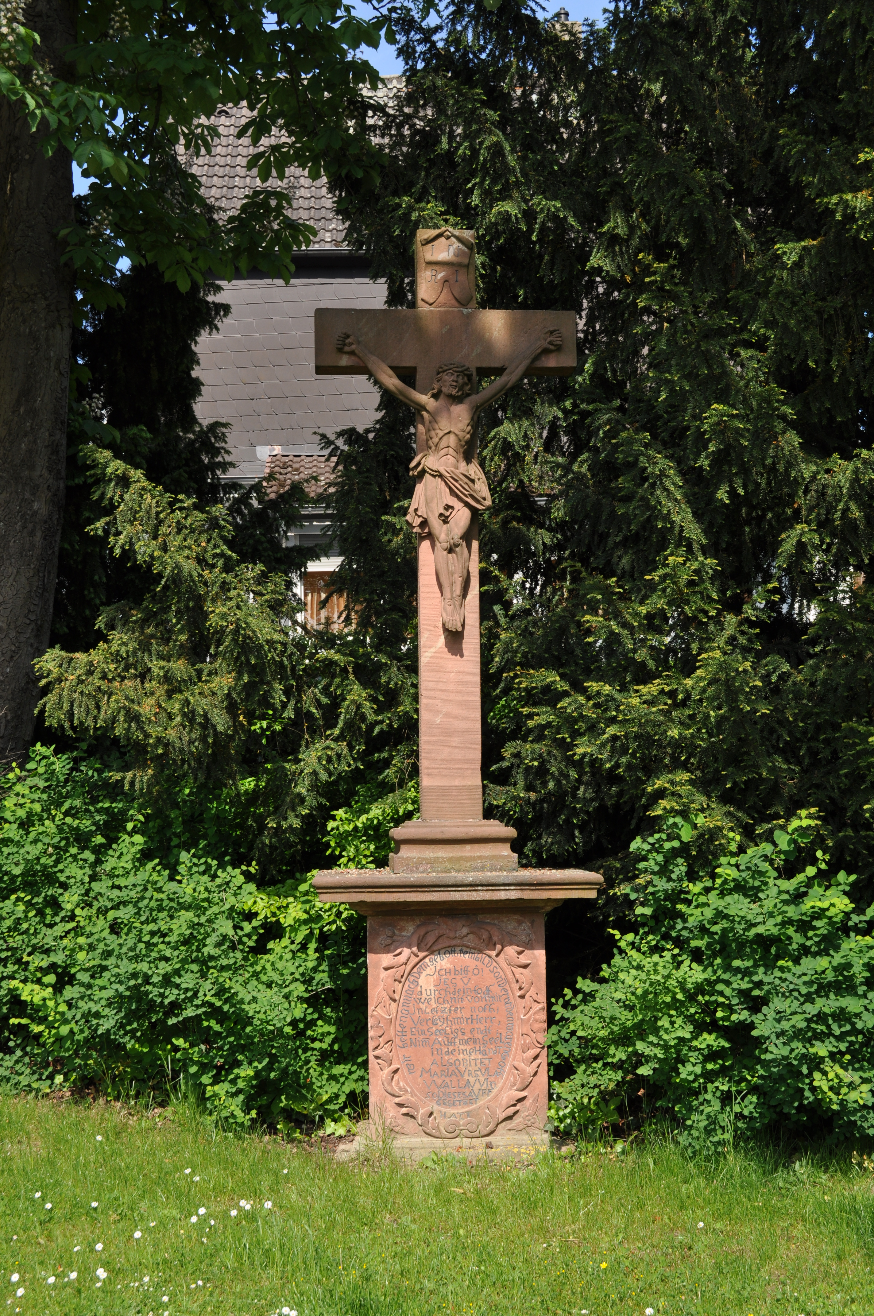 Von Vikar Nikolaus Kirsch gestiftetes Kreuz von 1739 vor dem Alten Friedhof Oberursel